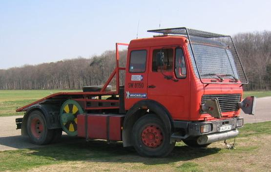 AFK-3 Winde mit einem Triebwerk für Schlepp und Fahrbetrieb